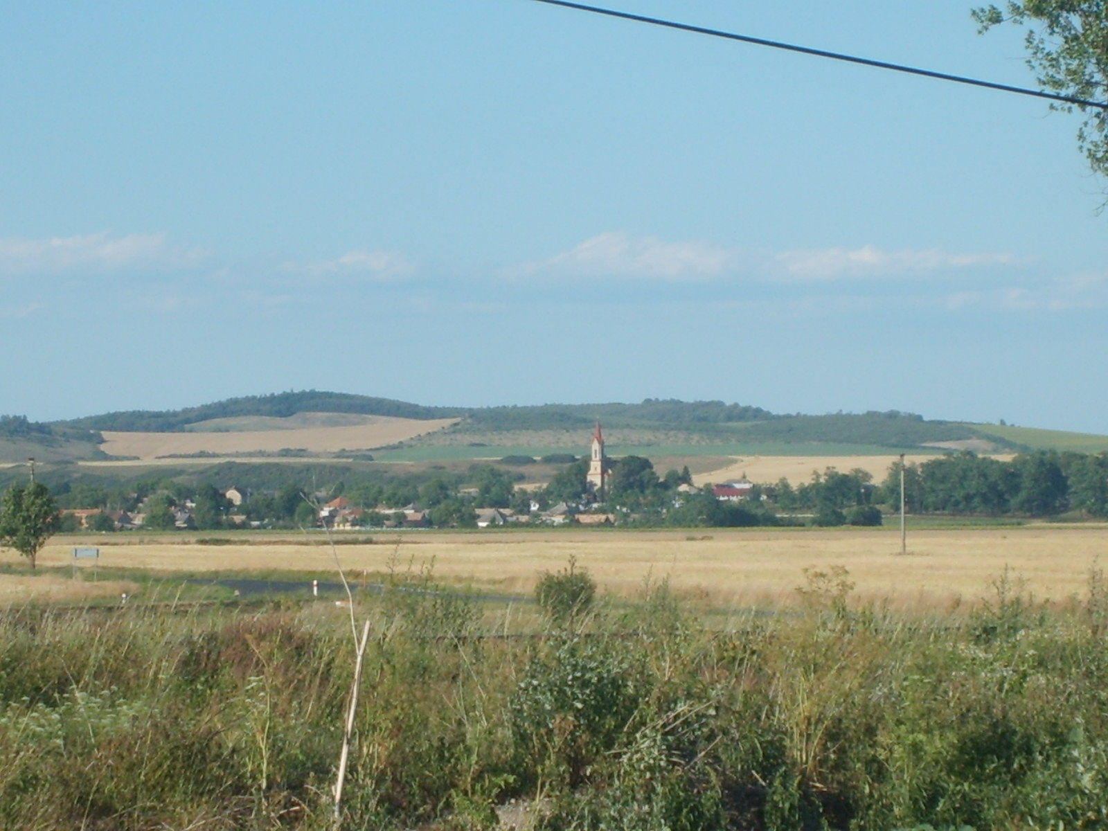 Abafalva látképe Lénártfalva felől